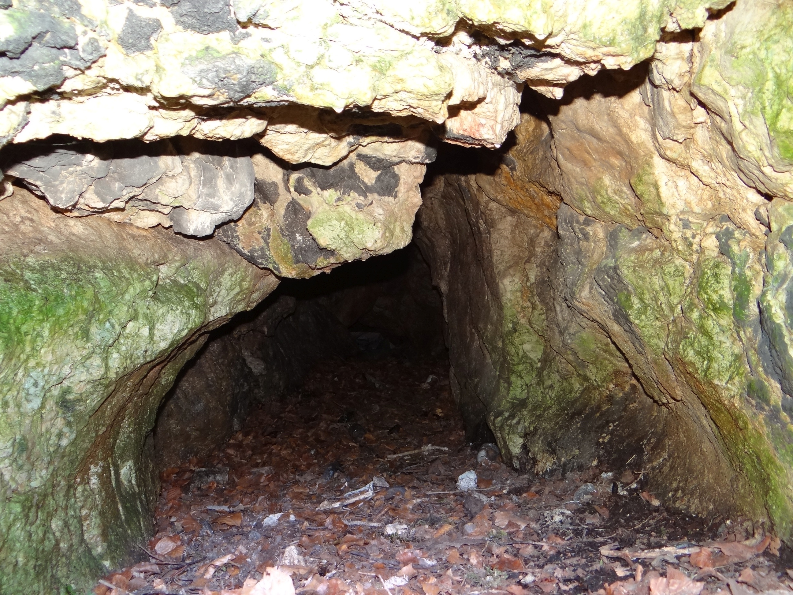 Jaskinia Szklana w Szklarach (w Bukowej Górze). Korytarza za otworem pn. zach.